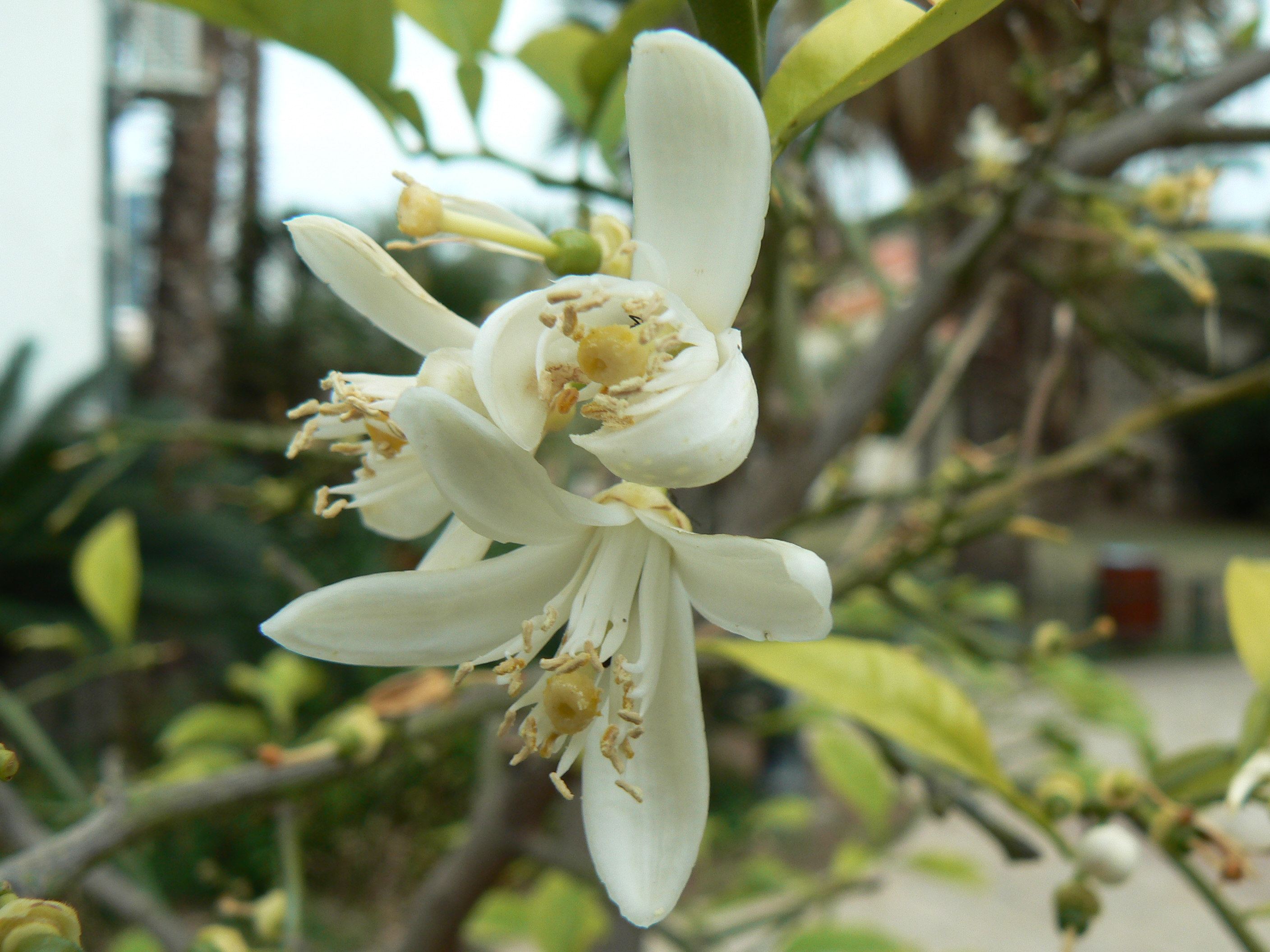 פרח התפוז